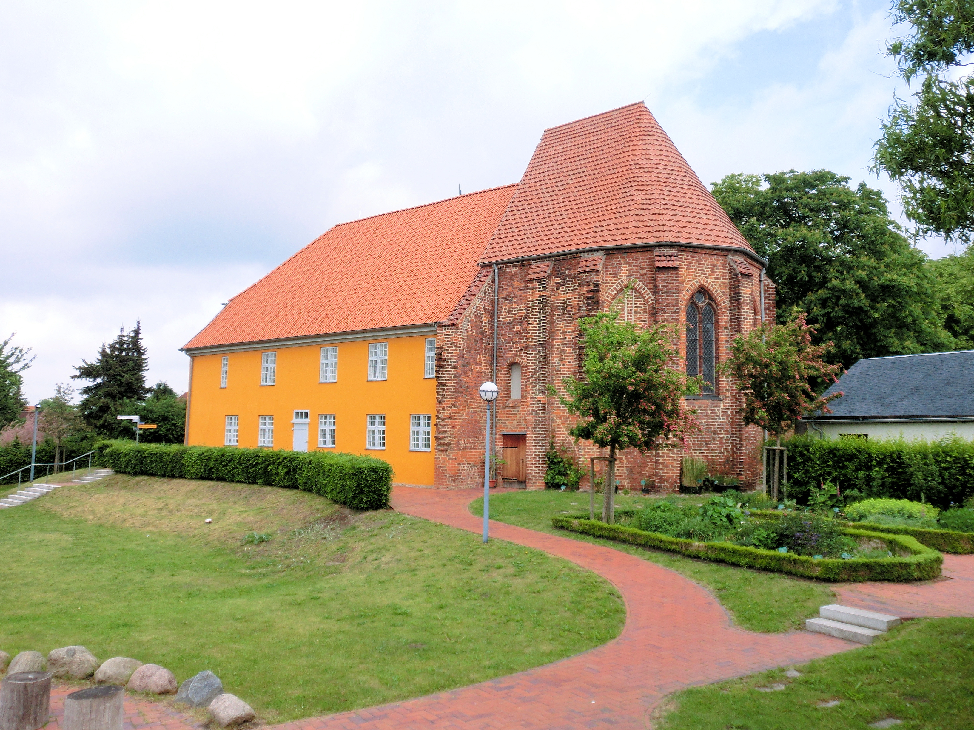 Niederdeutsches Bibelzentrum St. Jürgen Barth, Ansicht von Süden